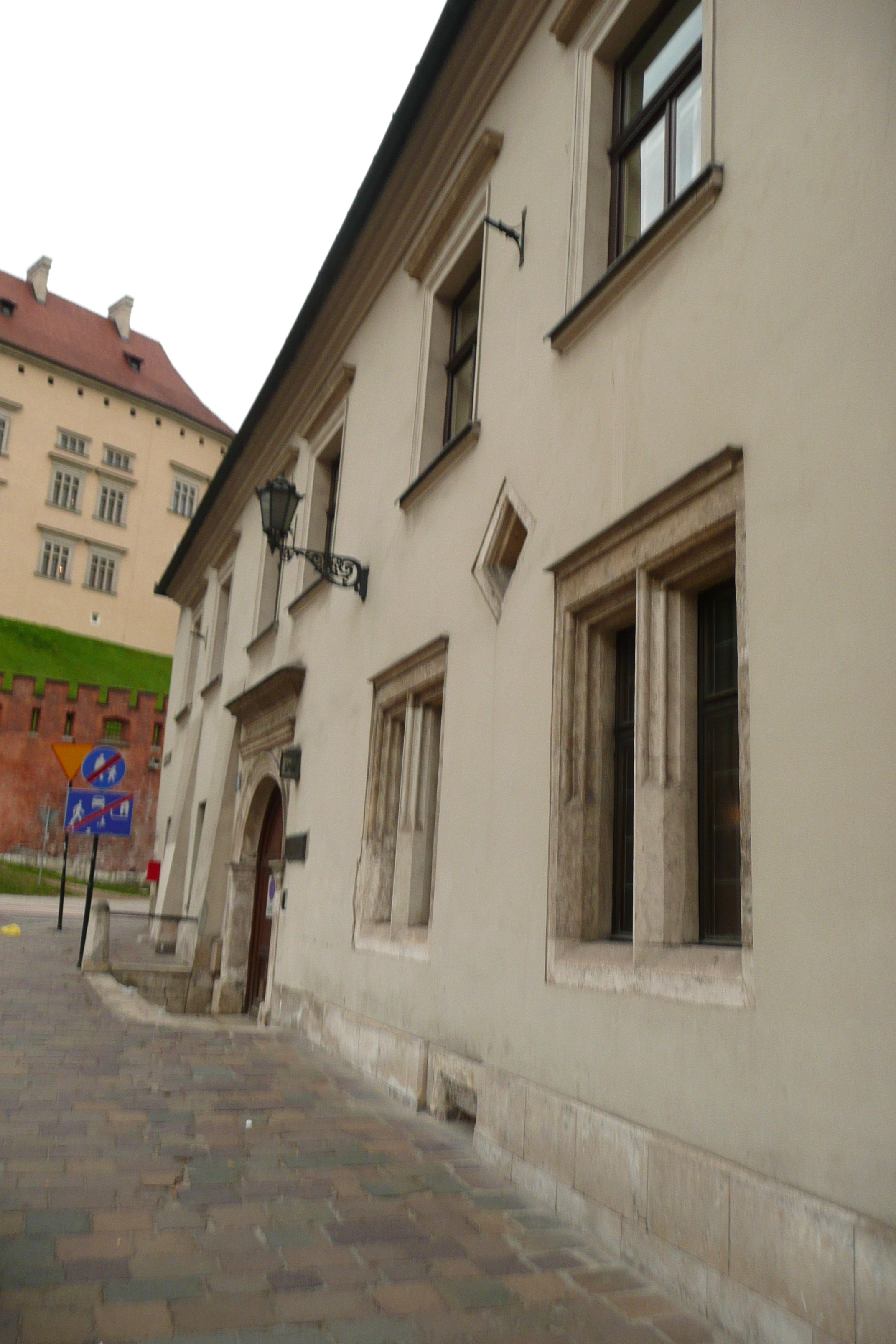 Dom Długosza, Kraków.